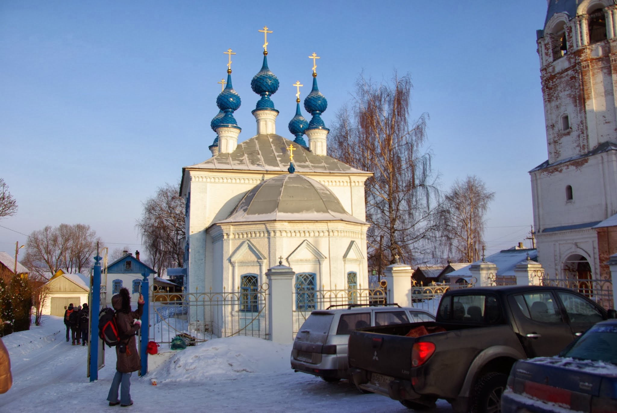 Galich, Kostromskaya oblast', Russia